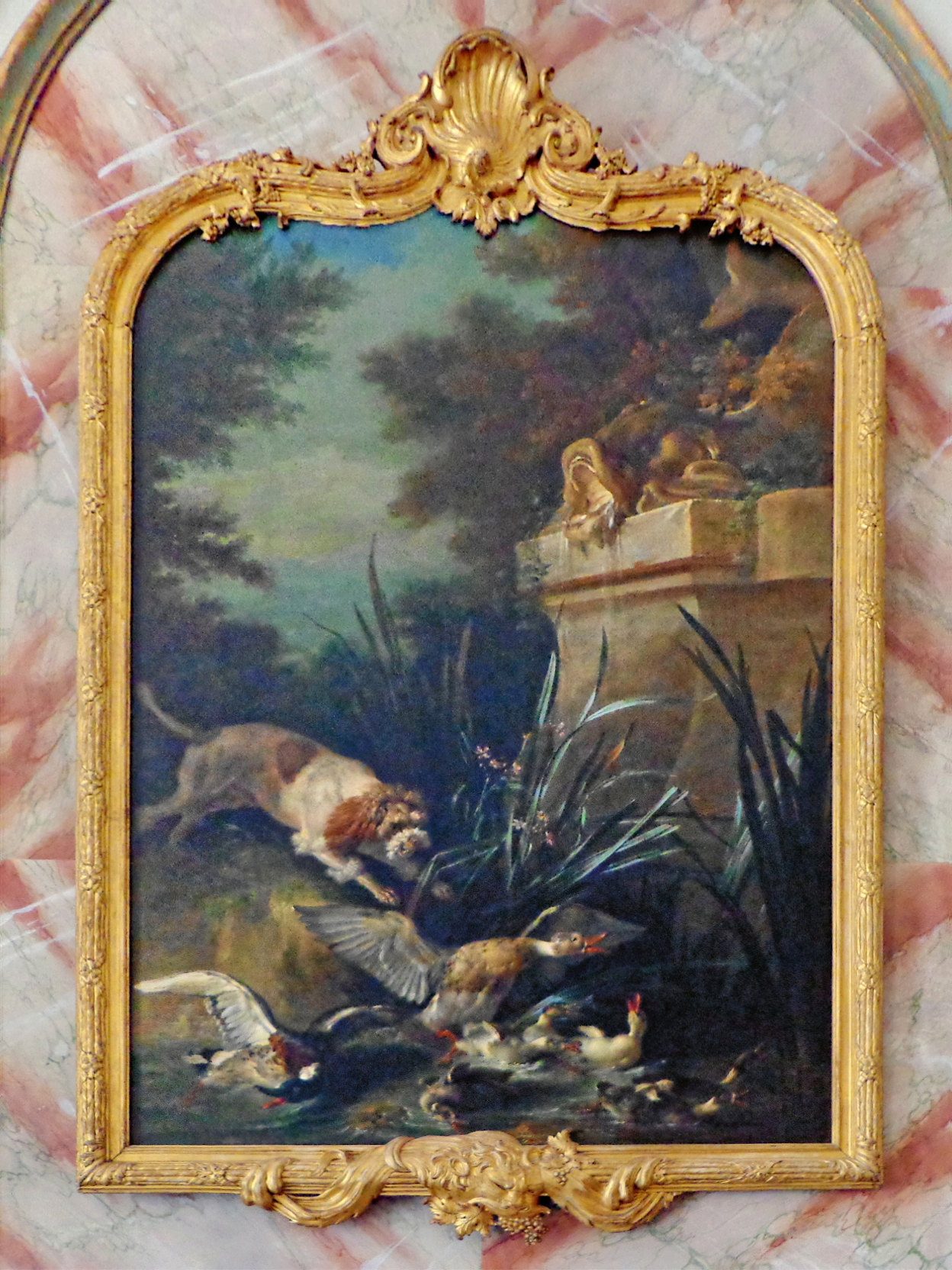 Oeuvre de Jean-Baptiste Oudry datée de 1742